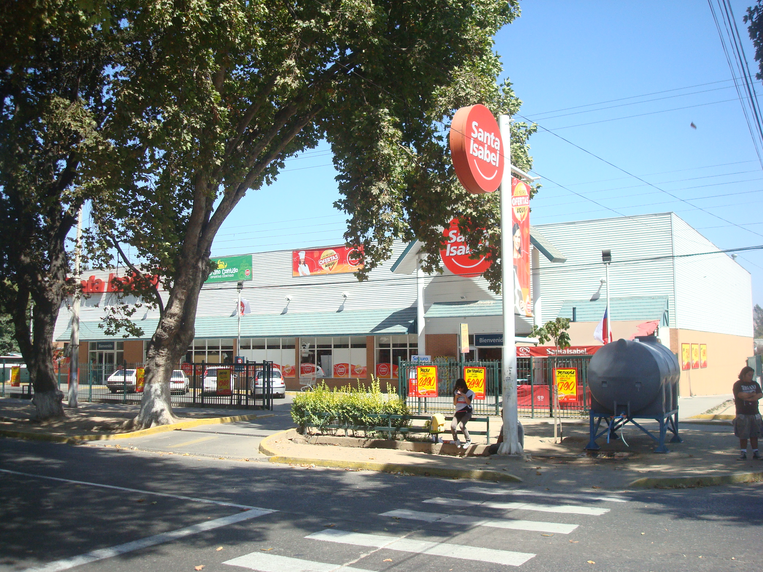 Supermercado Santa Isabel, San Francisco de Limache, Chile